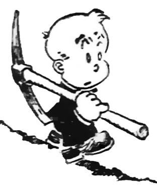 Freigestellte Figur aus einem Jerry on the Job-Comicstrip: Jerry mit Spitzhacke